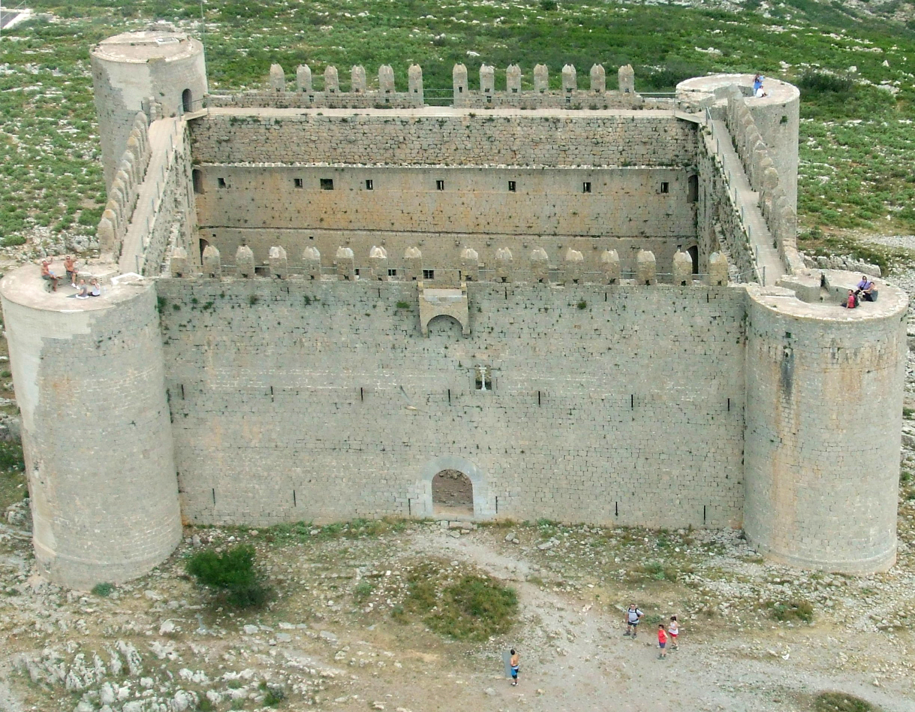 Castell de Montgrí (Torroella de Montgrí)